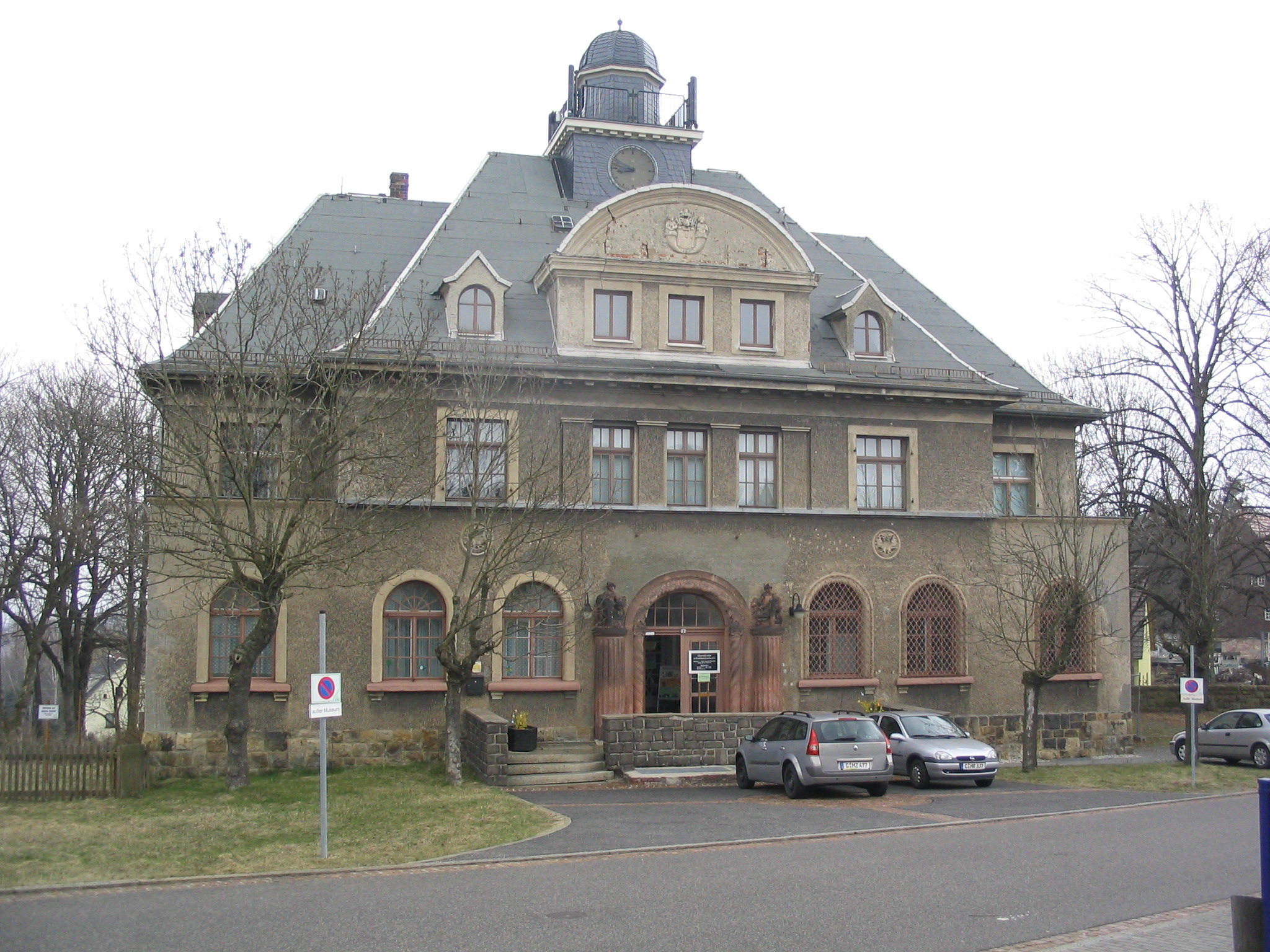 Schulmuseum (früheres Rathaus) im Chemnitzer Stadtteil Ebersdorf, aufgenommen am 12.04. 2006 von Dr. Hagen Graebner